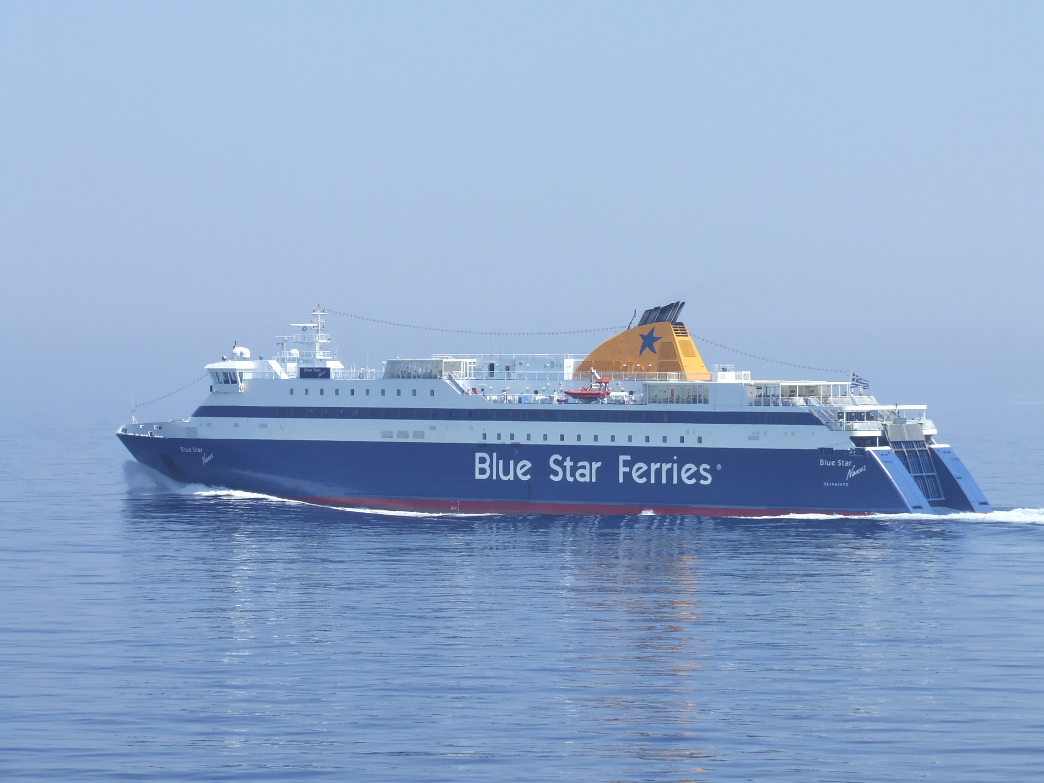 Blue Star Ferries vessel 'Blue Star Naxos' near Santorini